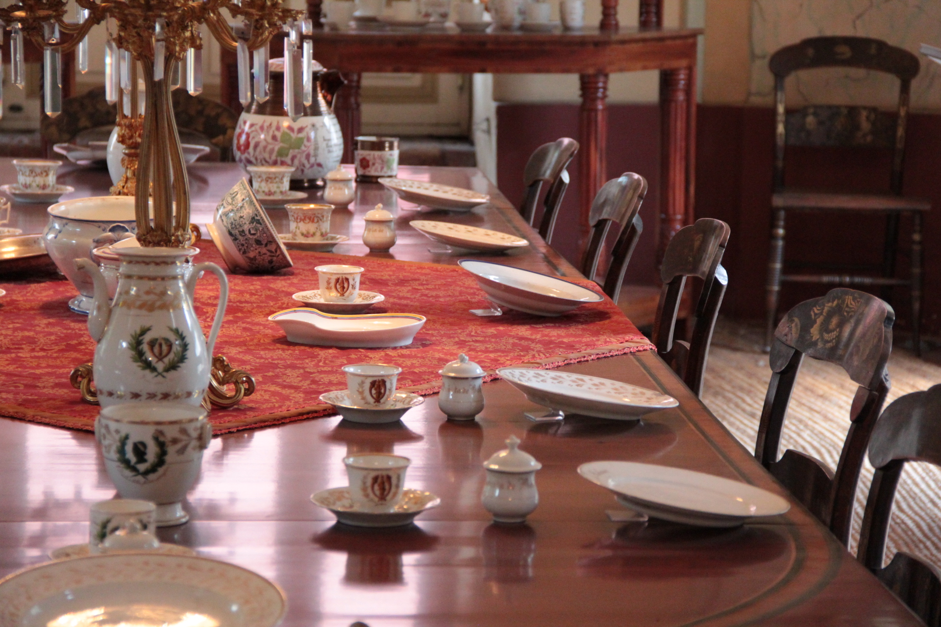 Quinta de Bolívar. En la Imagen comedor de la quinta de Bolivar